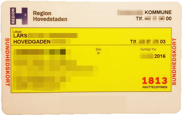 Dansk sundhetskort